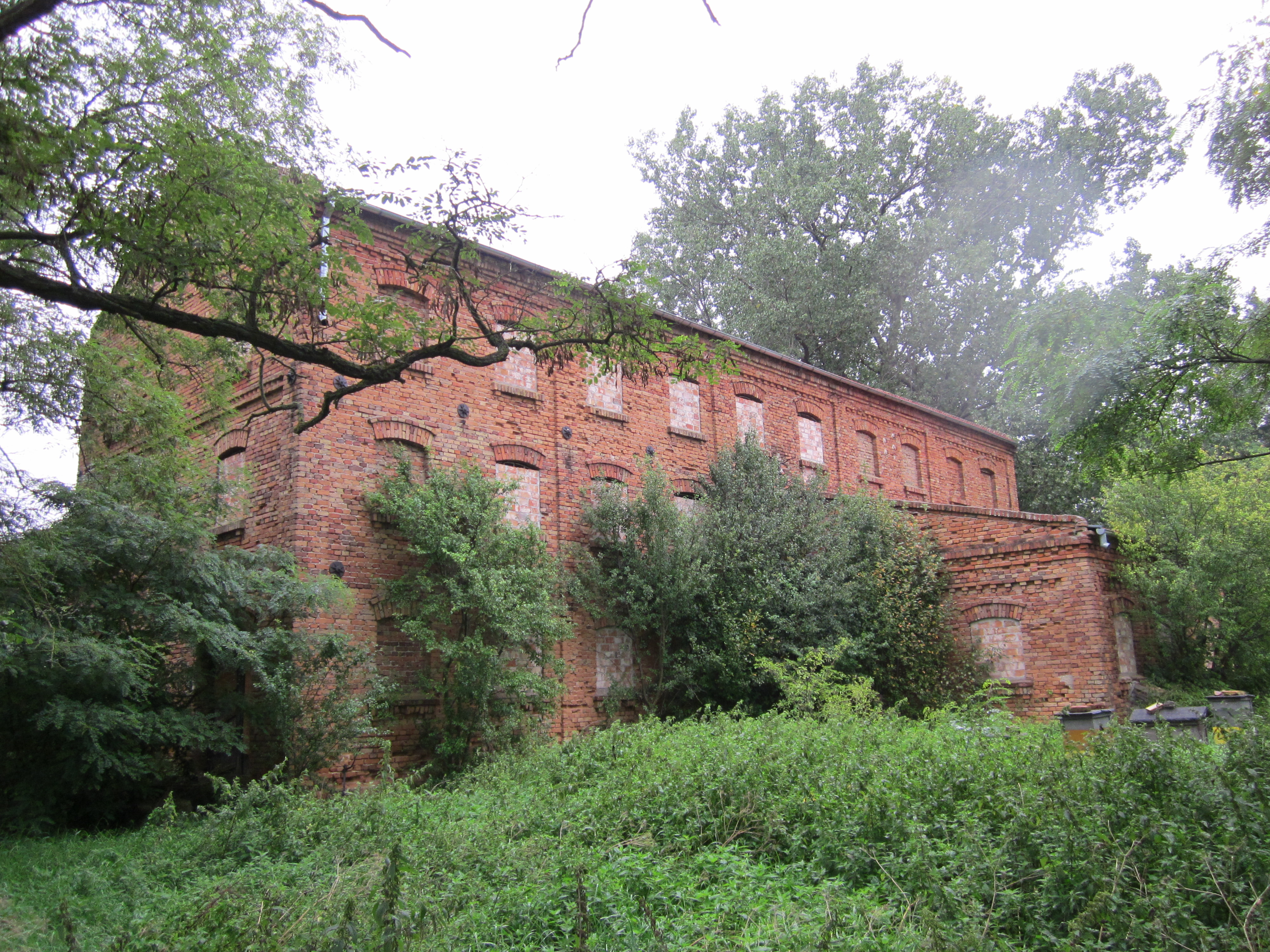 W 1919 r. Kurowo weszło w posiadanie Franciszka Kołodziejskiego (mieszkał w Kurowie pod nr 714), to właśnie on wybudował młyn motorowy w 1925 r. oraz cegielnię. Ze względu na słabej, jakości cegłę i poniesione koszty w 1932 r. majątek został rozparcelowany przez Bank Rolny. Zapewne miało to również związek z Reformą Rolną.